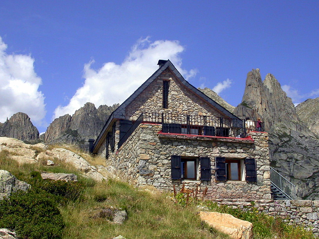 Refugi d'Amitges